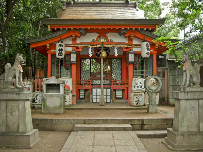 稲荷神社の狛犬（2004年、生田神社にて投稿者本人による撮影） Category:狛犬の画像